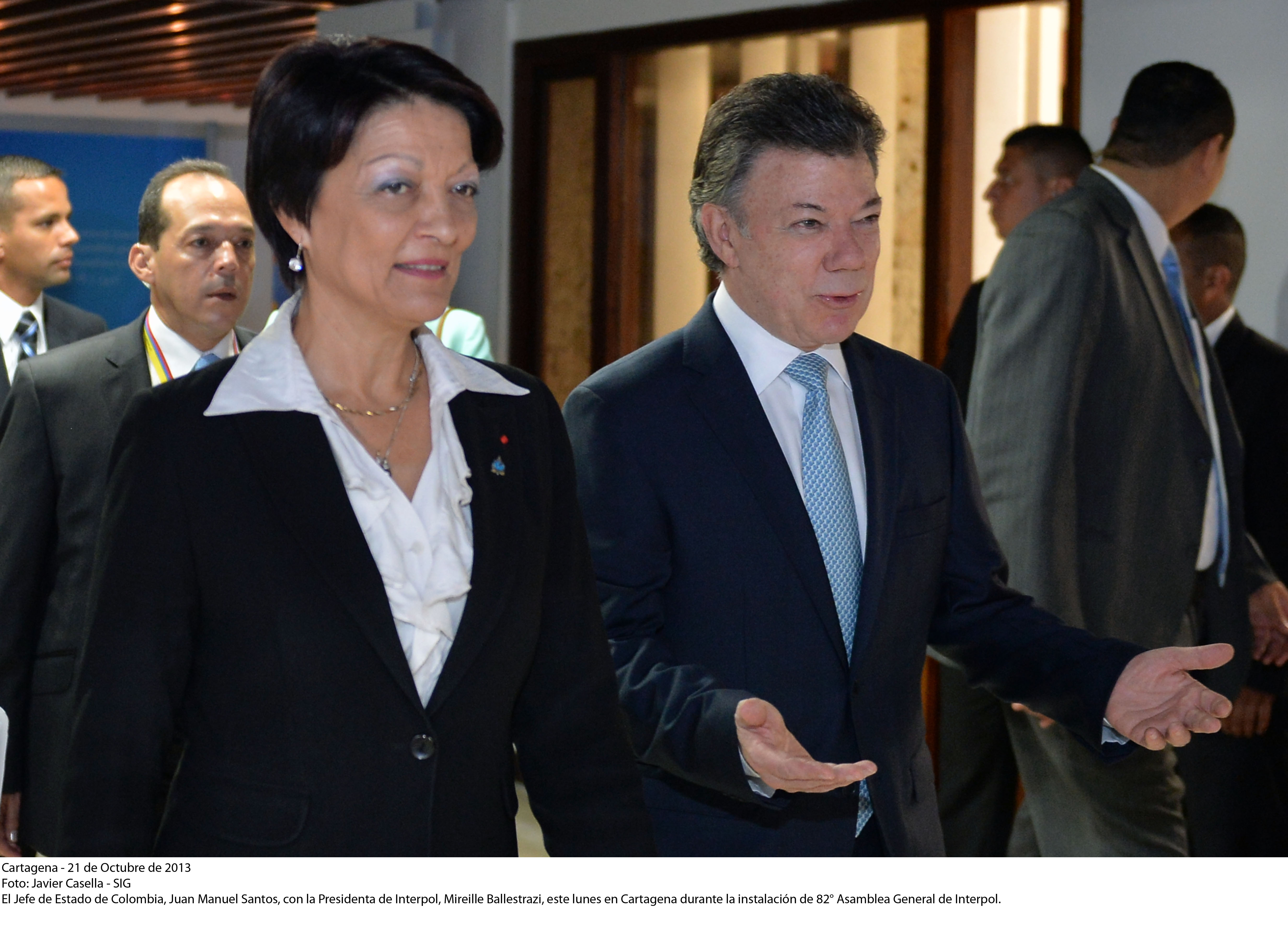 Asamblea 82 de Interpol, Cartagena, Colombia